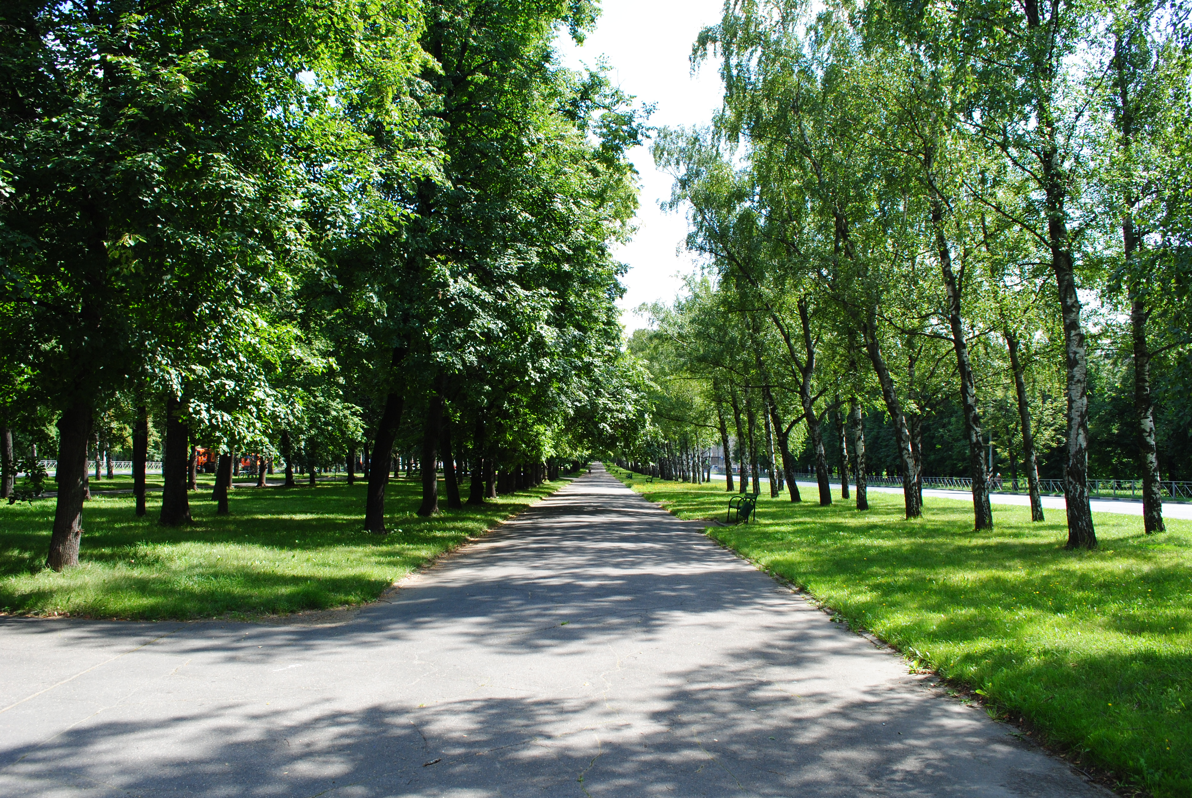 Университетский проспект (вид от проспекта Вернадского в сторону Ленинского проспекта)